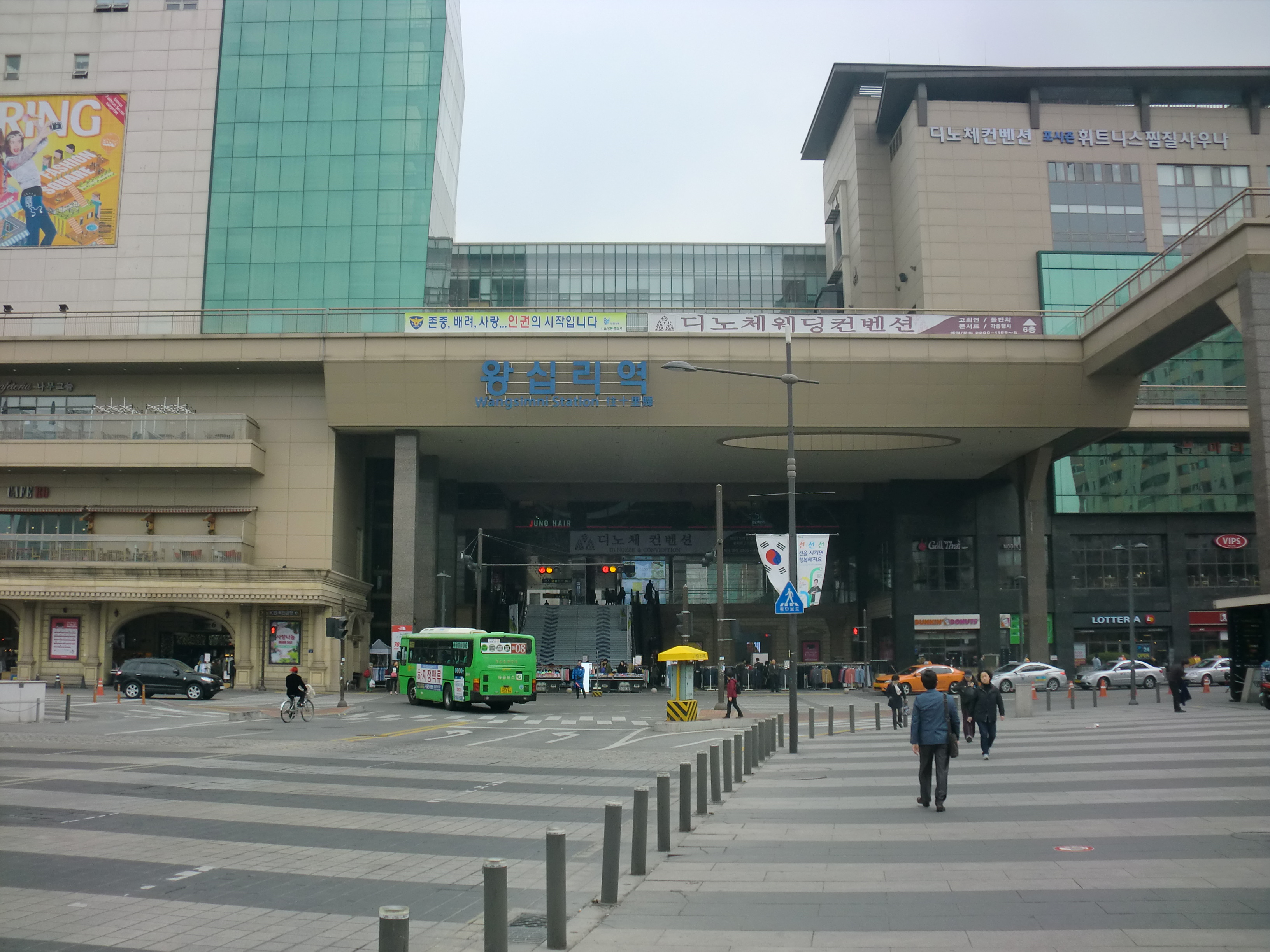 왕십리역